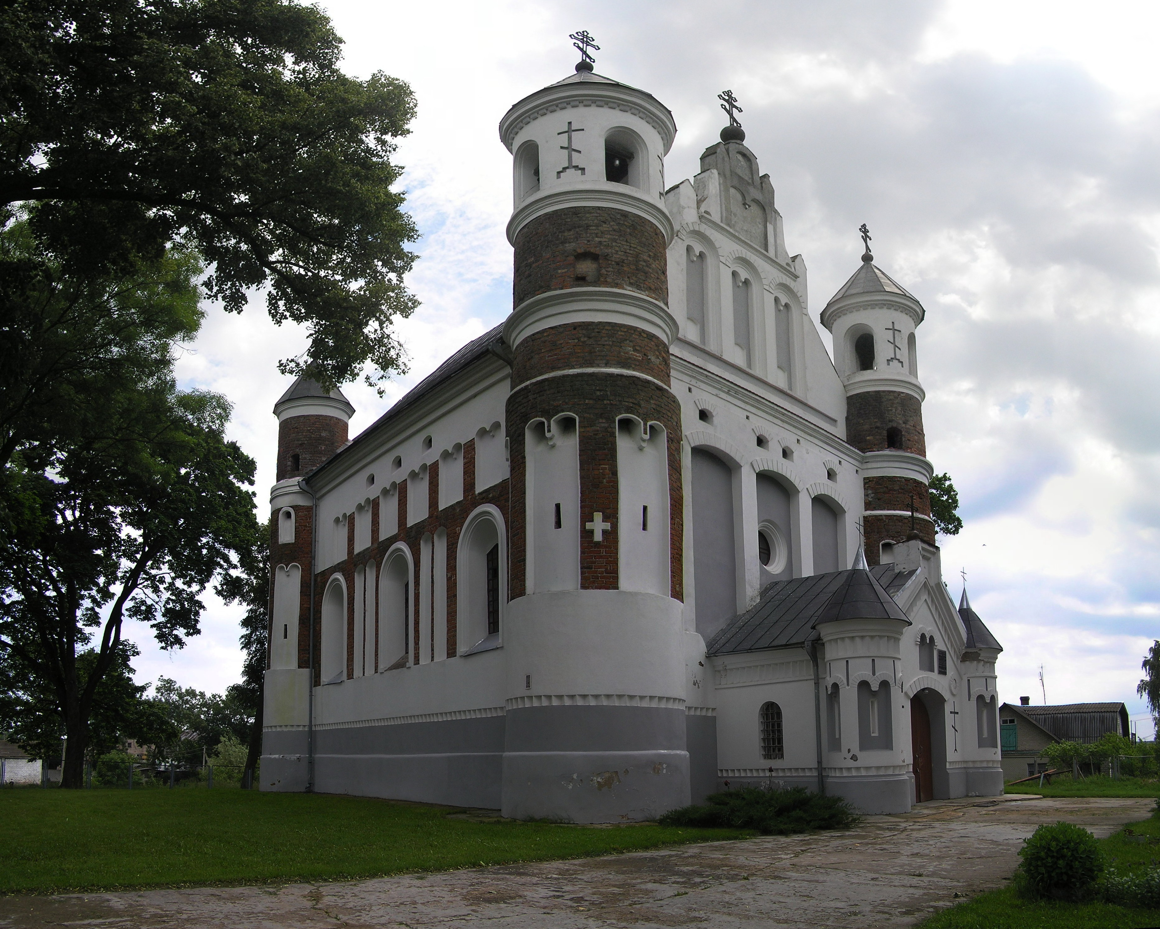 Беларуская (тарашкевіца): Сьвята-Раства-Багародзіцкая царква(крэпасьць абарончага тыпу). в. Мураванка This is a photo of Belarusian heritage monument. Reference number: 410Г000638 ( WLM)